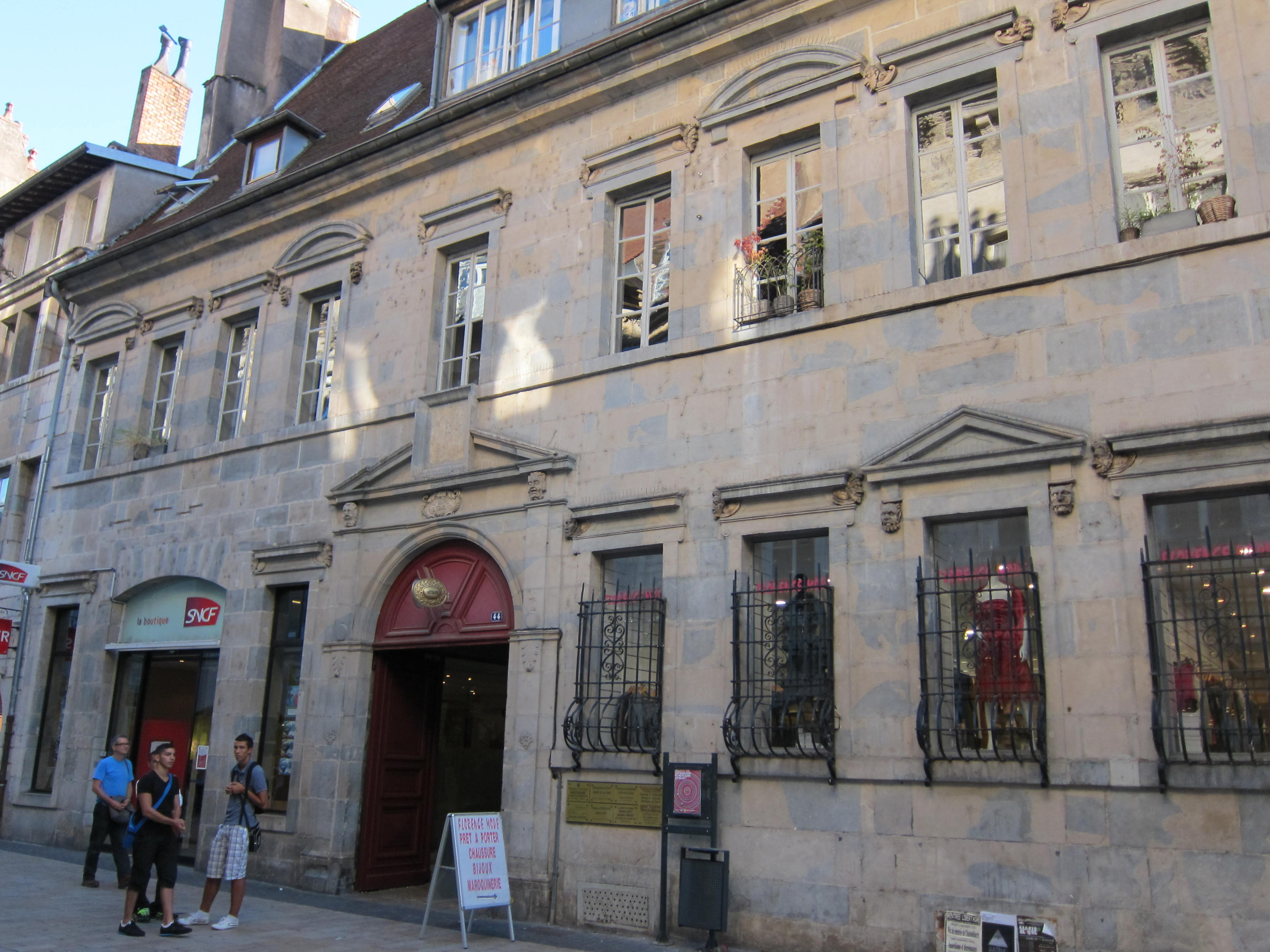 Hotel d'Anvers